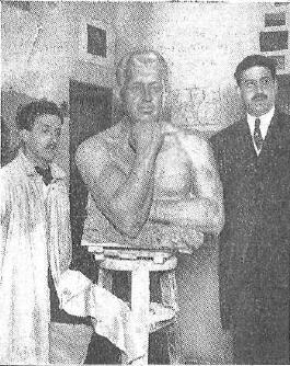 Fotografía que muestra al escultor Rafael Vela del Castillo junto a una estatua del periodista El Caballero Audaz